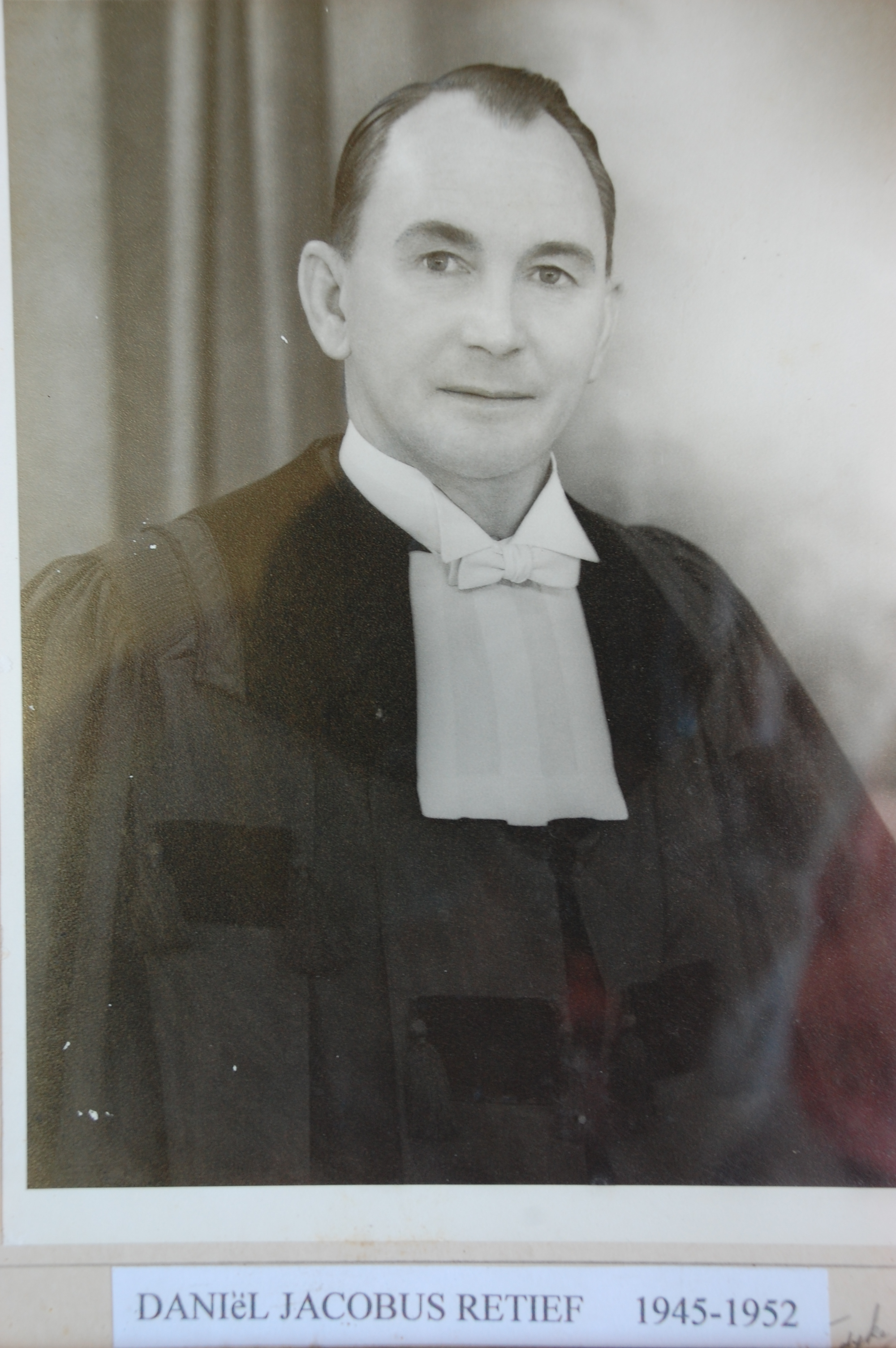 Emeritaat ontvang